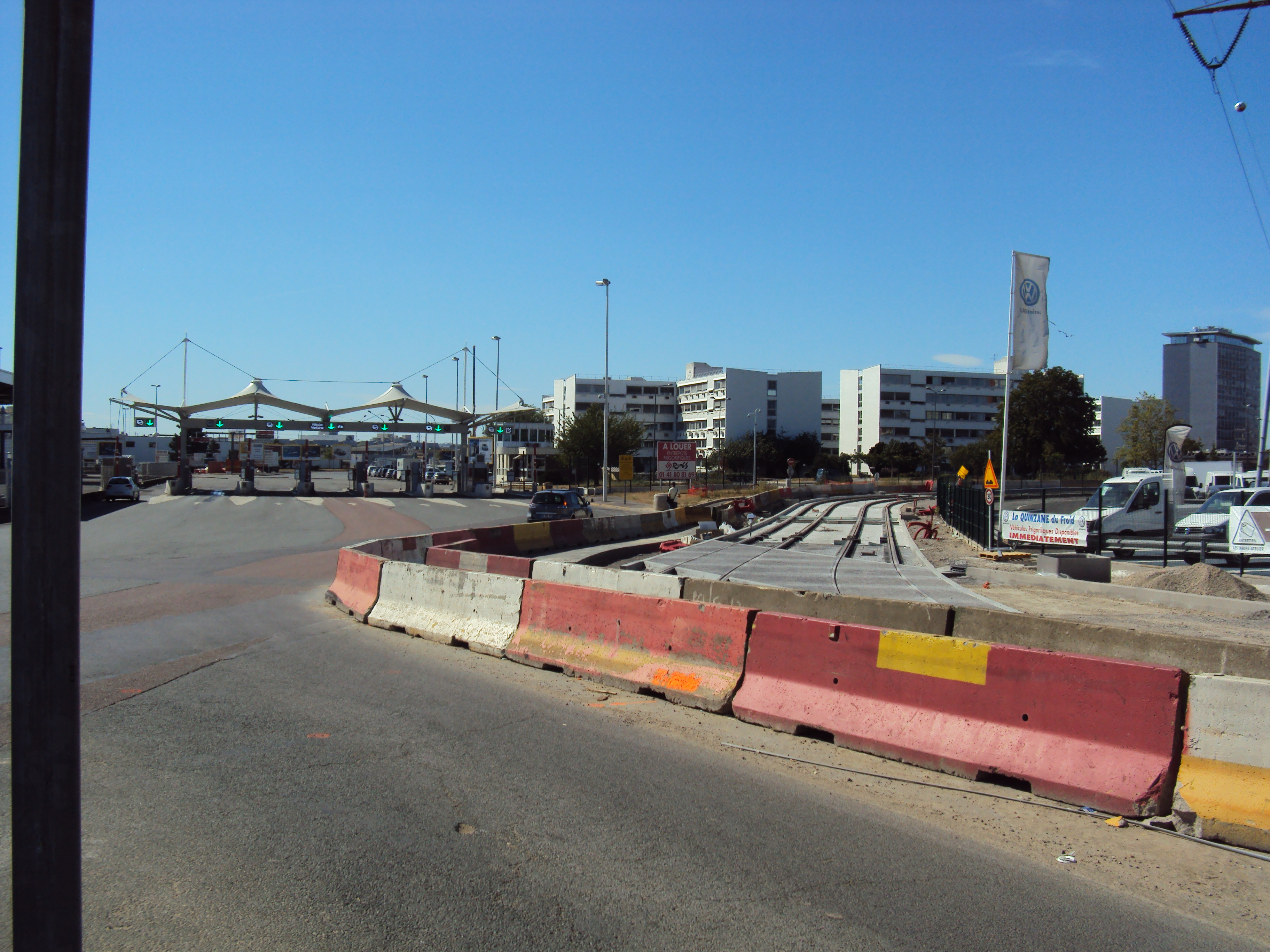 Les travaux du T7 au Nord de Belle épine. A l'arrière plan l'entrée du marché international de Rungis